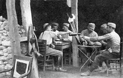 французькі артилеристи п'ють вино. 1916 рік. French artillers (1916)